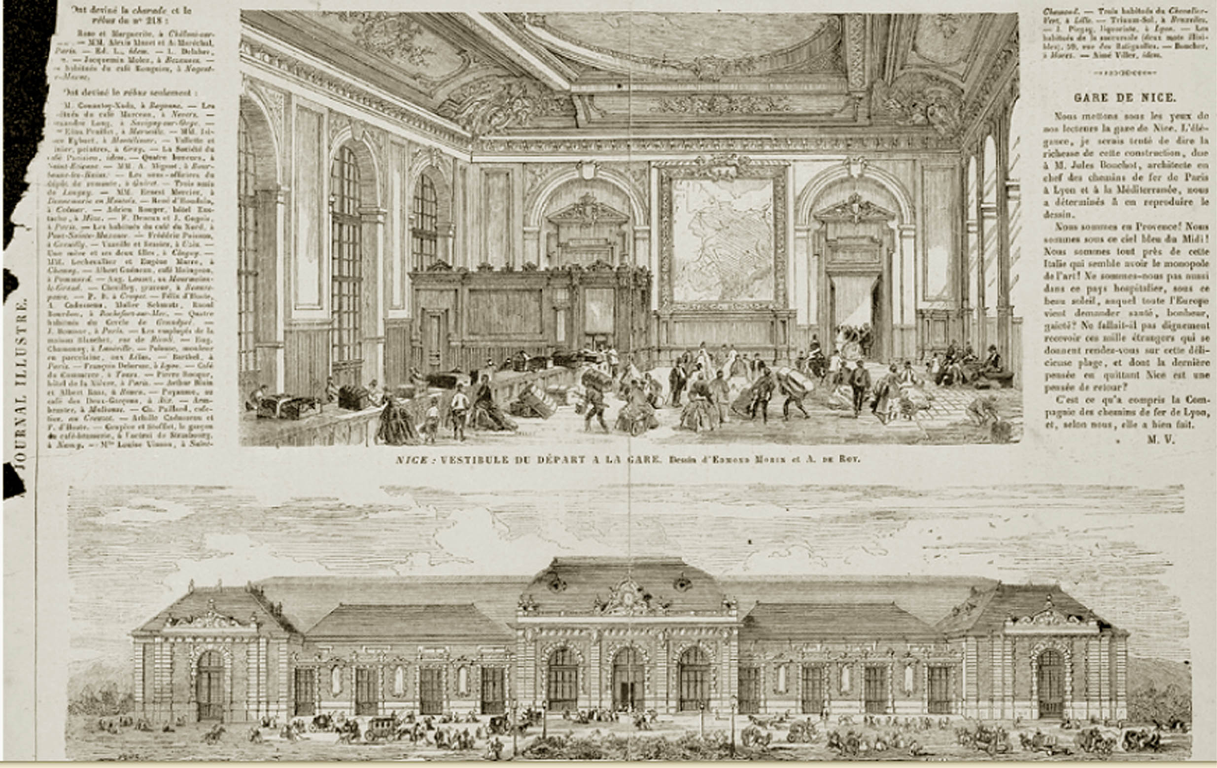 L'intérieure de la gare de Nice PLM vers 1865. France.